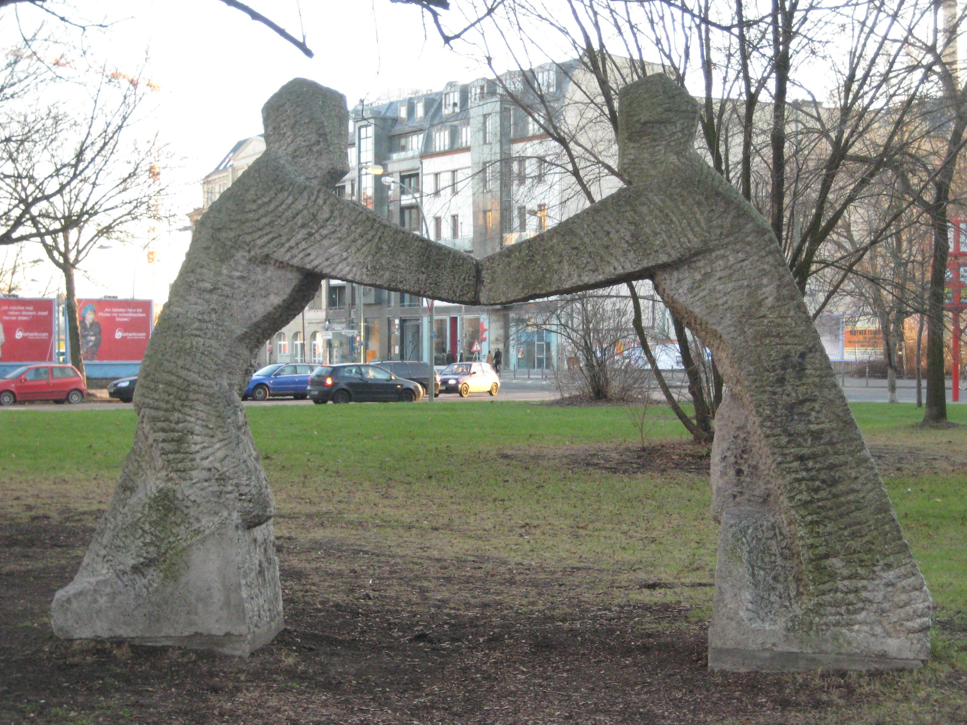 sculpture „Wiedervereinigung“ („Reunification“) by Hildegard Leest (1962) at Chausseestraße and Liesenstraße in Berlin, near former border crossing Chausseestraße